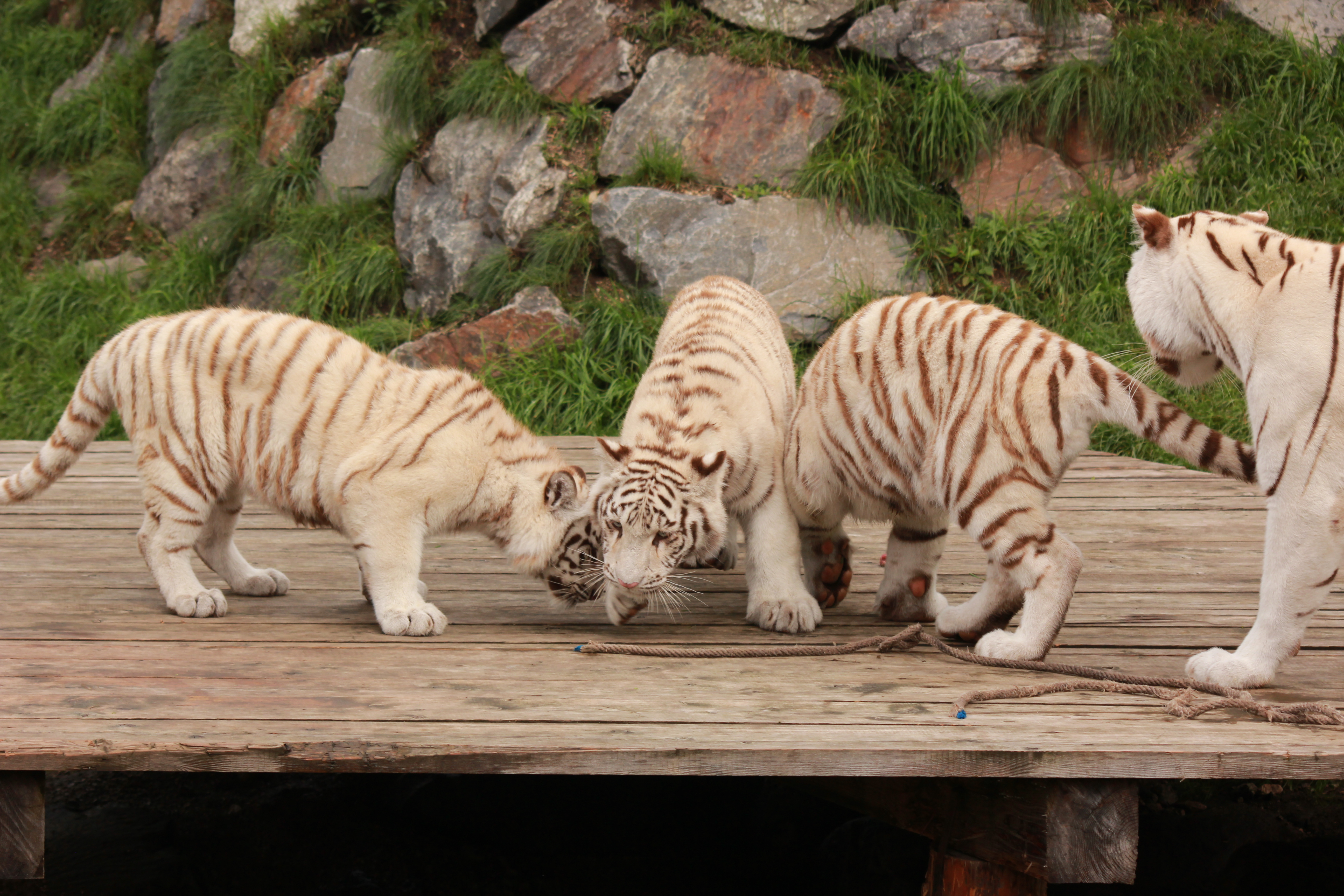 Weiße Tiger im Weißen Zoo des Kameltheaters Kernhof in Niederösterreich